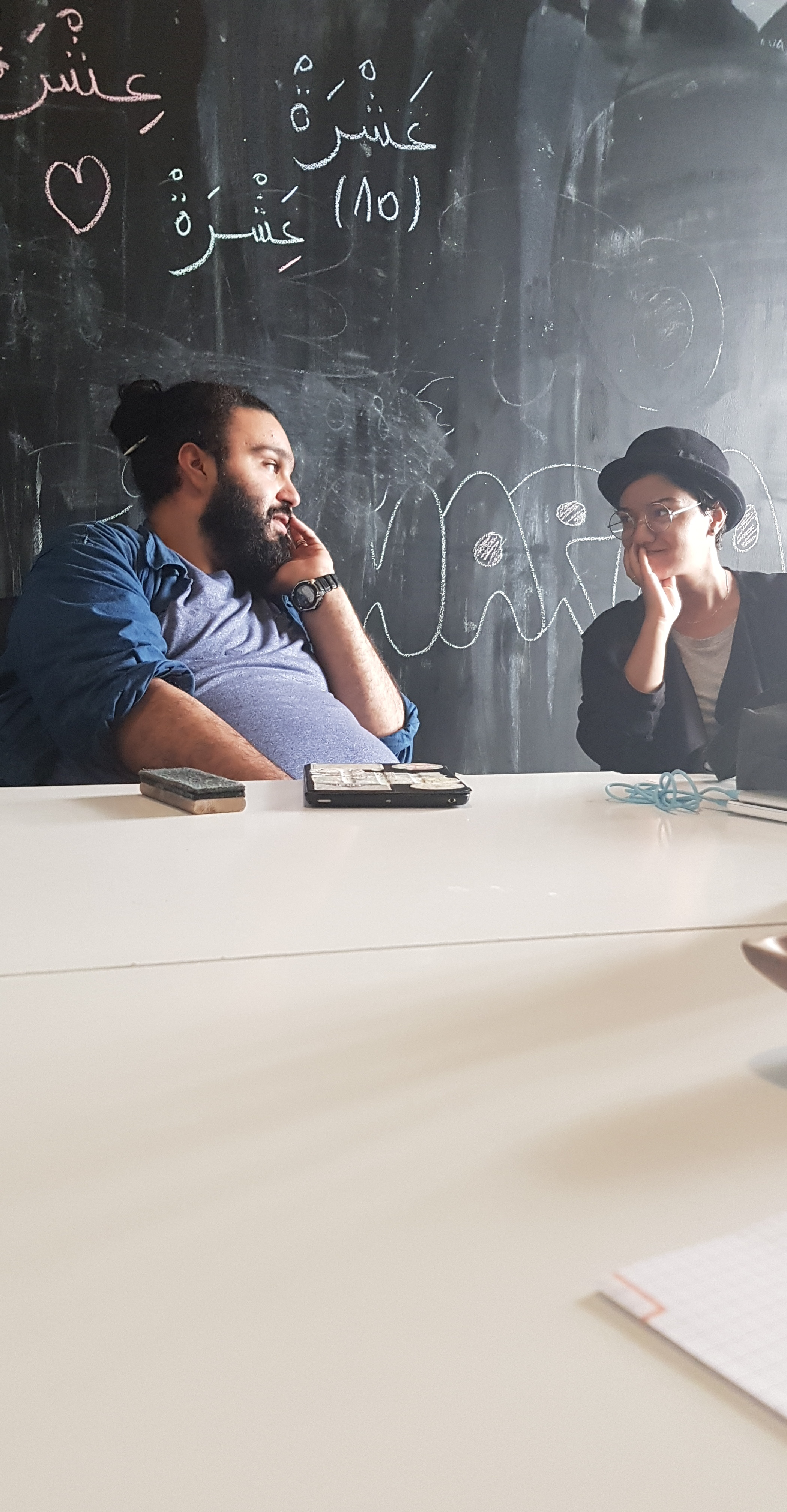 محرران يتبادلان الأفكار أثناء اجتماع لهيئة تحرير جريدة المدينة